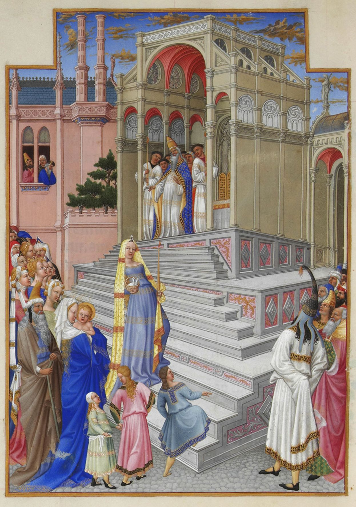 La Vierge tient le Christ dans ses bras ; une auréole émane de sa tête et se mêle à celle de son fils. Elle est suivie de Joseph et d'un cortège de personnages. Une servante, seule sur les marches, assure la transition avec le grand prêtre situé plus haut. Elle porte les deux colombes offertes en sacrifice, ainsi qu'un cierge allumé.